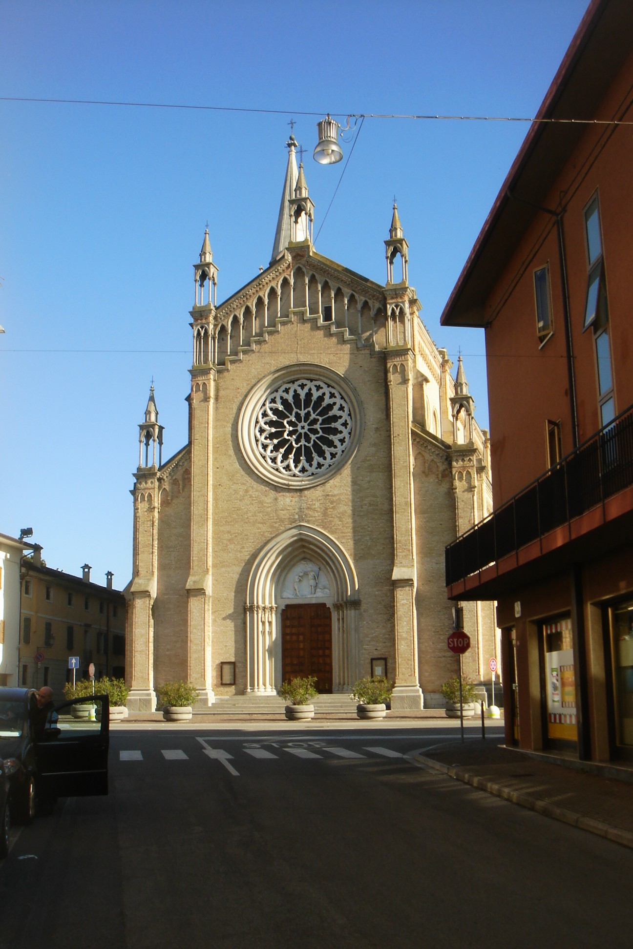 Casarsa della Delizia, chiesa della frazione di San Giovanni